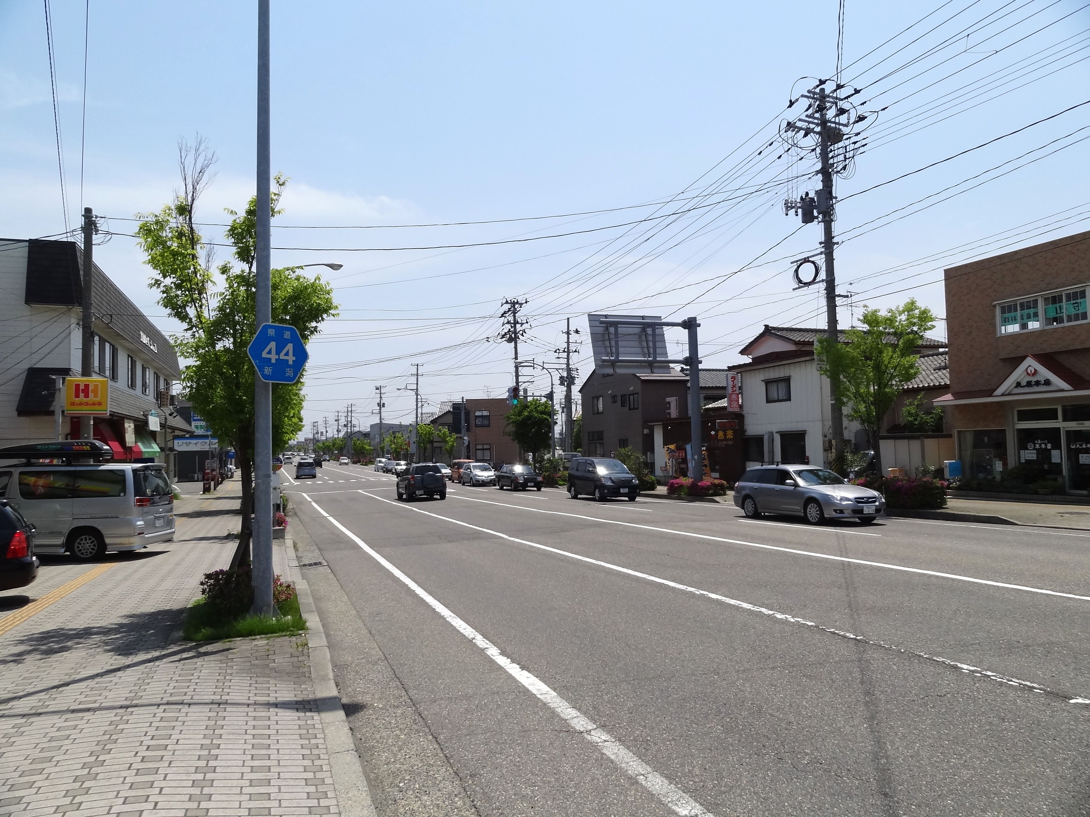 新潟県道44号 新潟市西区寺尾東付近